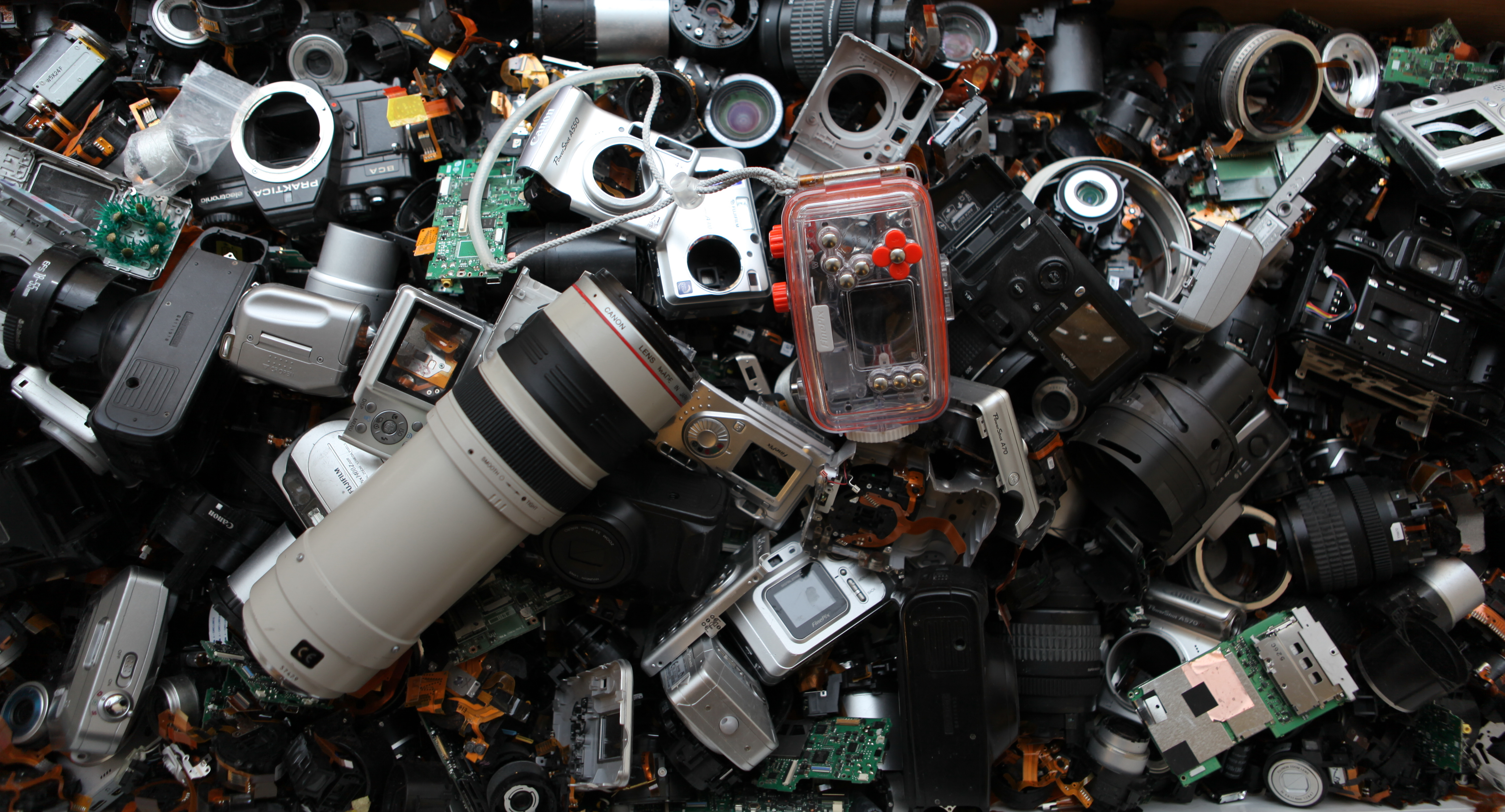 Camera parts. Servis fotoaparátů, nepotřebné díly fotoaparátu.